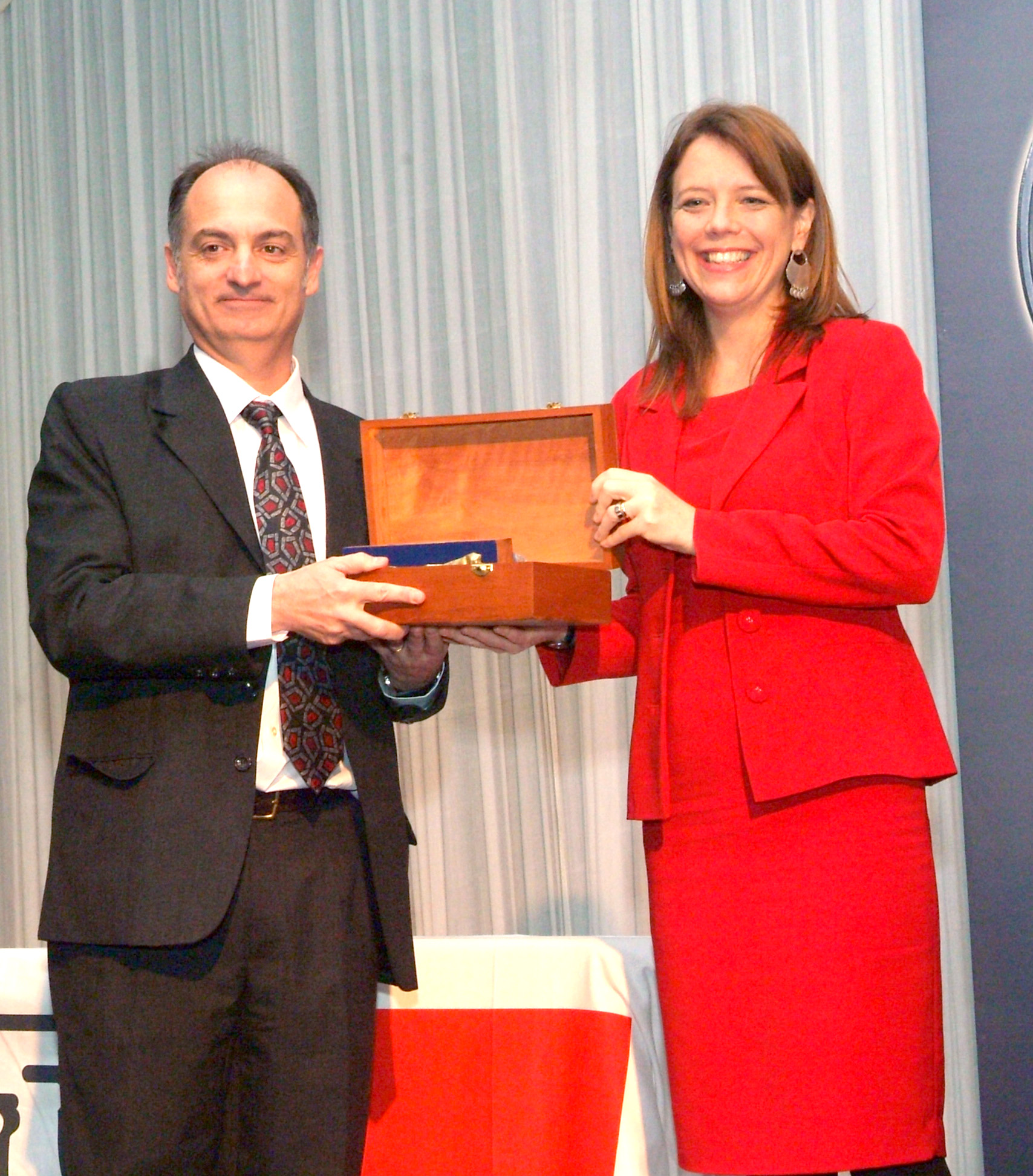 La Ministra Secretaria General de Gobierno,Ena von Baer,participa en la premiaciòn del periodista Nibaldo Mosciatti.Hotel Sheraton.